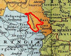 Lage des Friesenfelds um 1000